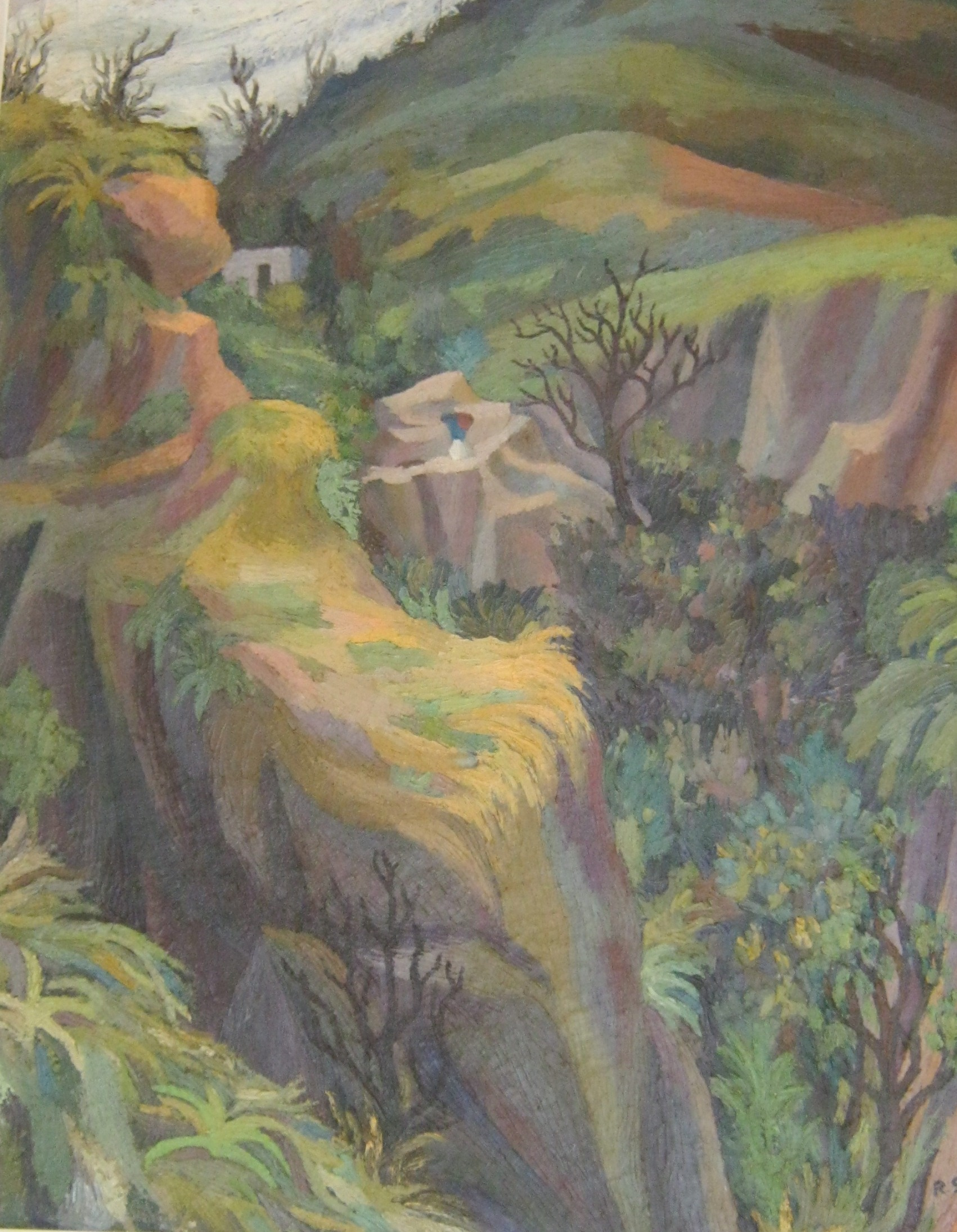 barraanca de la palma en lamagdalena contreras, D.F.